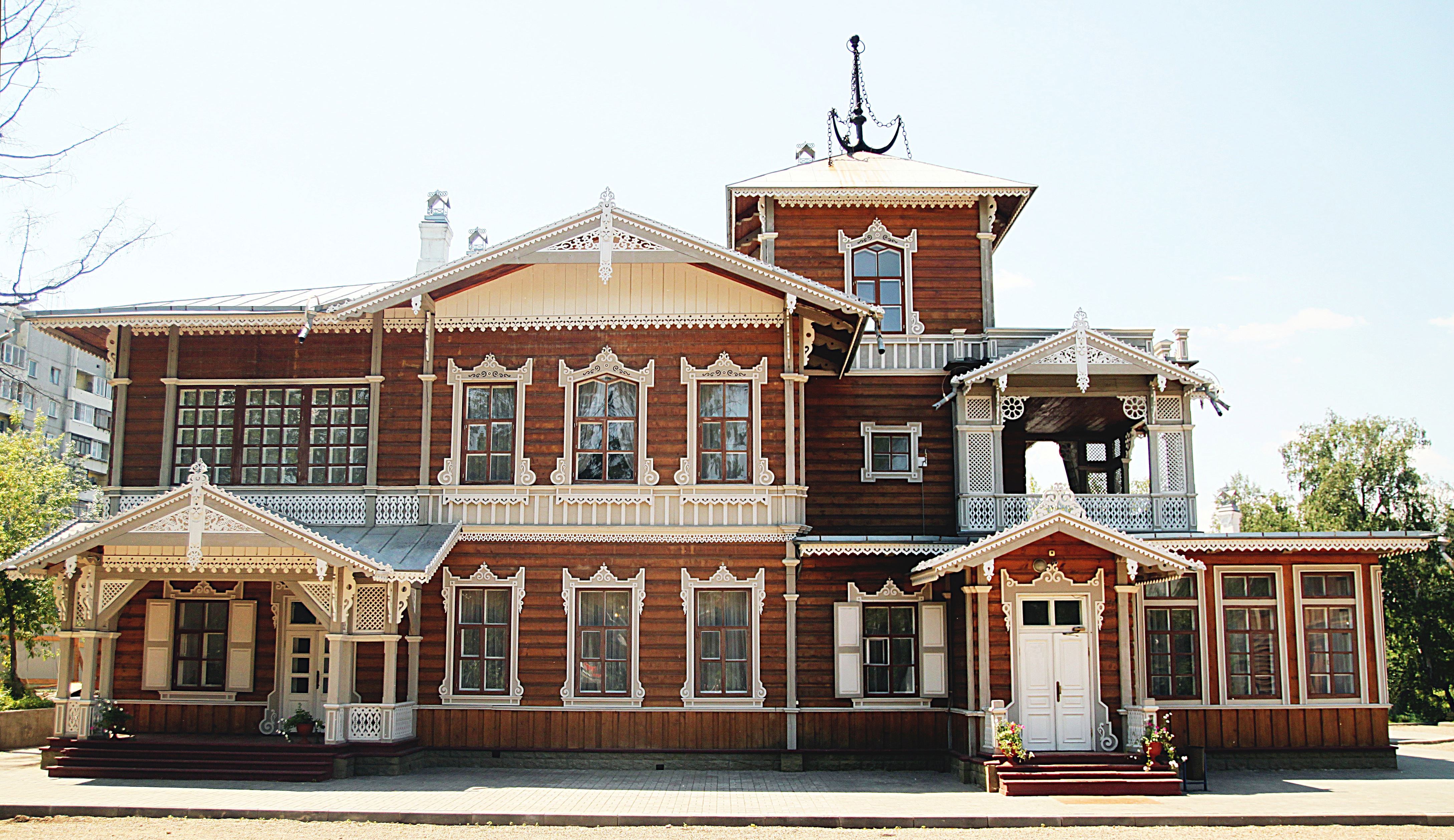 Иркутская область, город Иркутск, историко-мемориальный отдел Иркутского областного художественного музея, "Усадьба В.П. Сукачева", фасад здания Картинной галереи